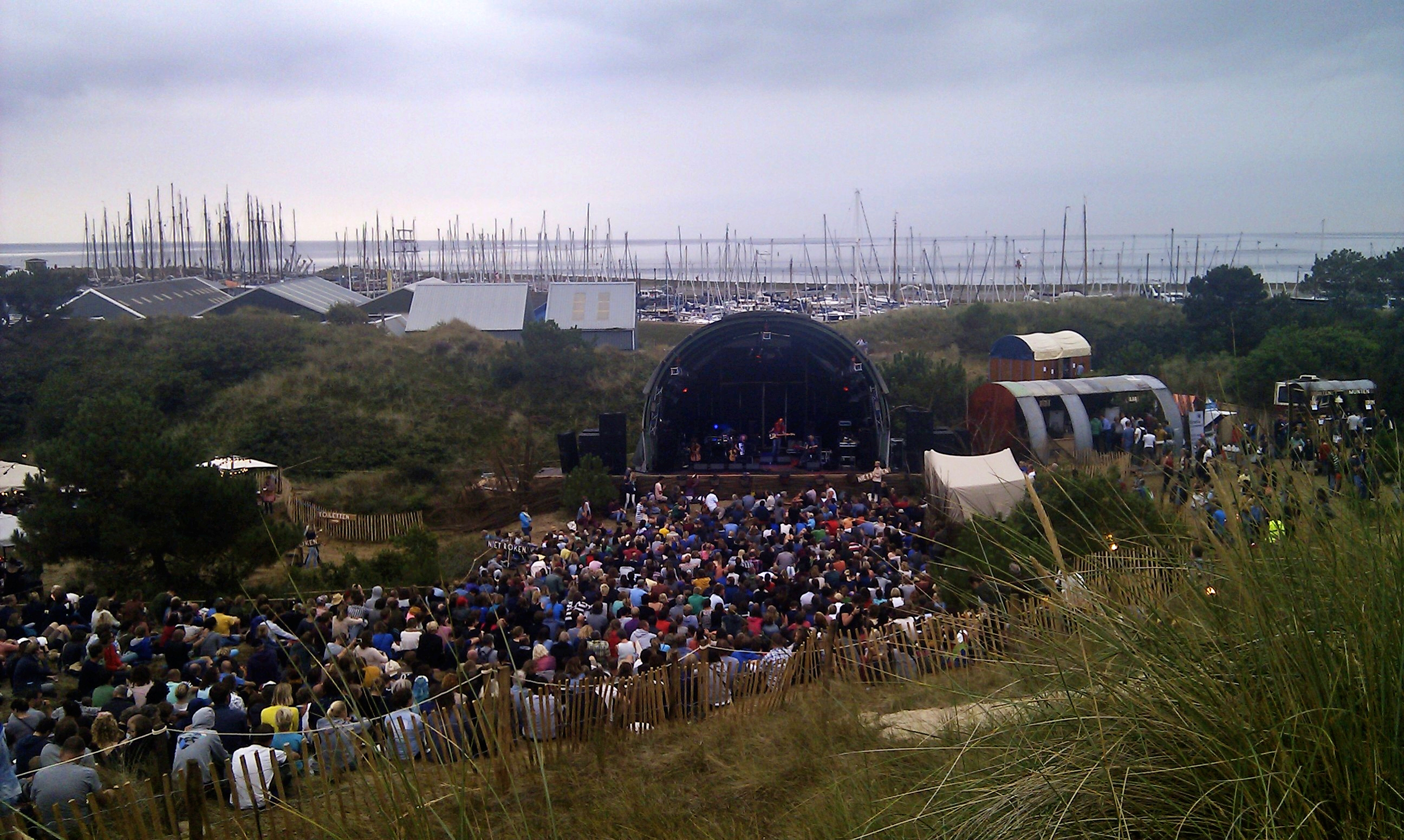 Podium "Tokkelbaan" op Into The Great Wide Open festival editie 2013 op Vlieland